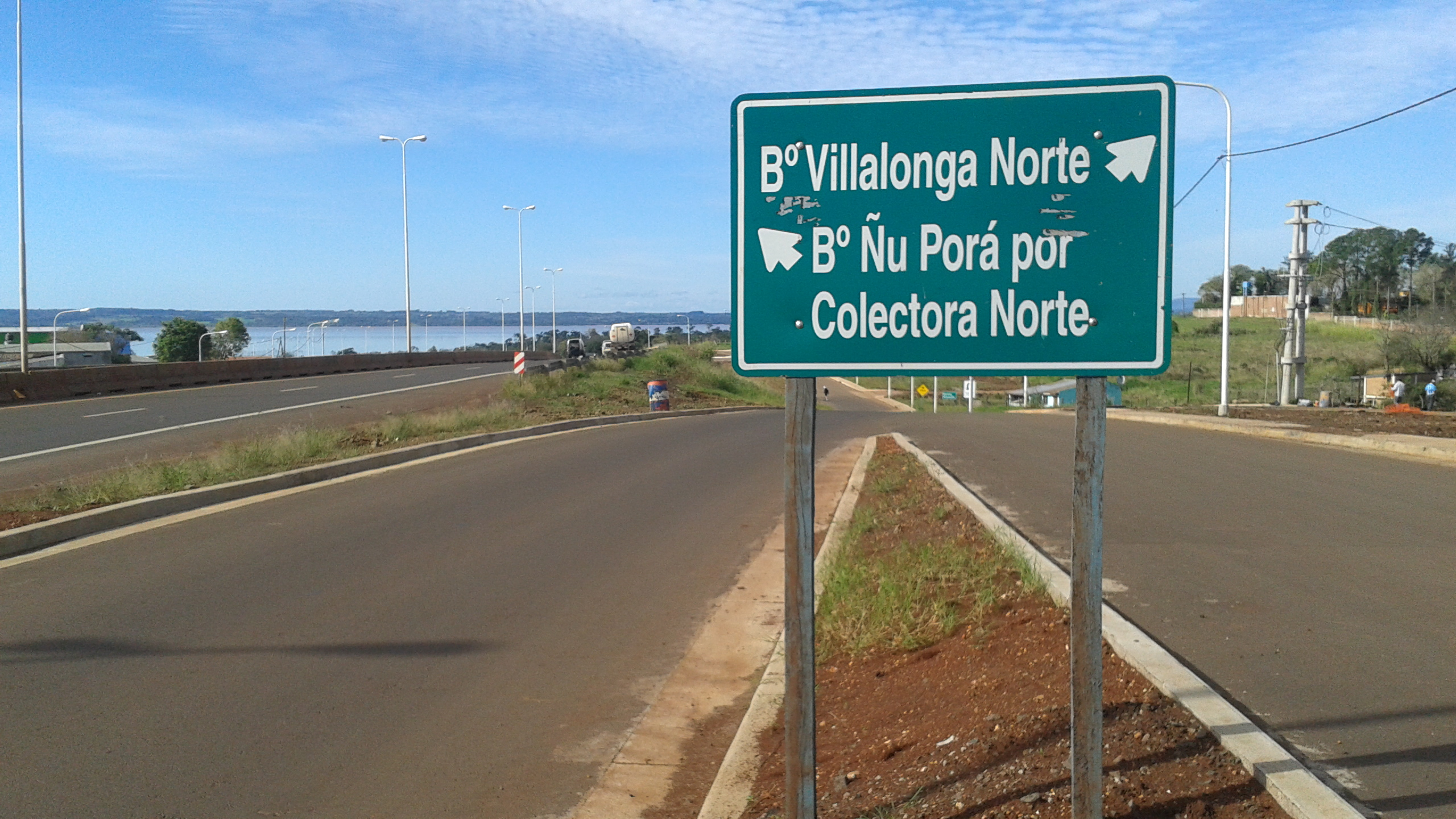 Cartel Posadas - Barrio Villalonga Norte - Barrio Ñu Porá por Colectora Norte. Fuenteː Periodista Horacio Cambeiro.